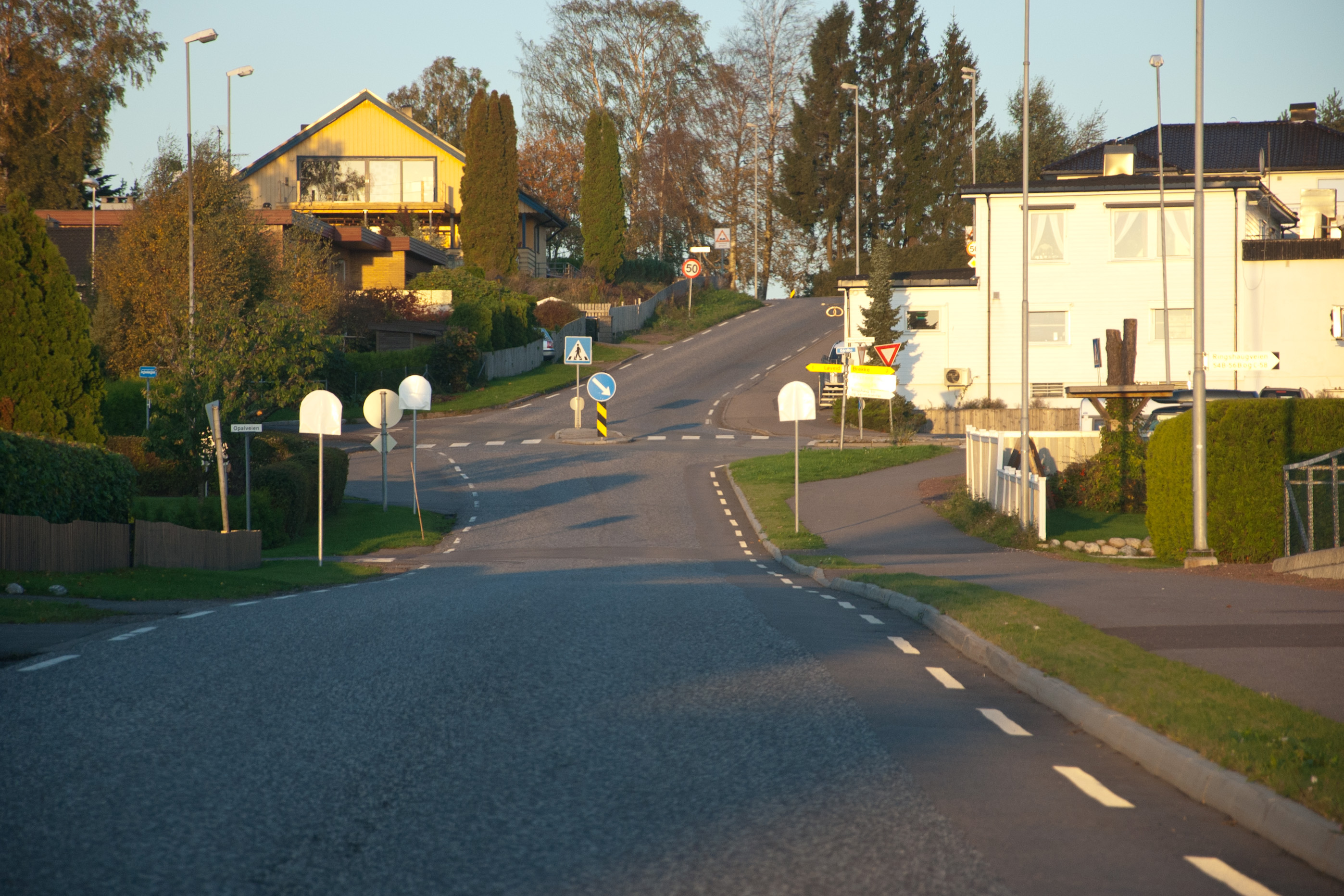 Gårdbo. Fylkesvei 537 Ringshaugveien i Tønsberg, Vestfold. Krysset mellom Ringshaugveien, Gårdboveien og Rosenlundveien.